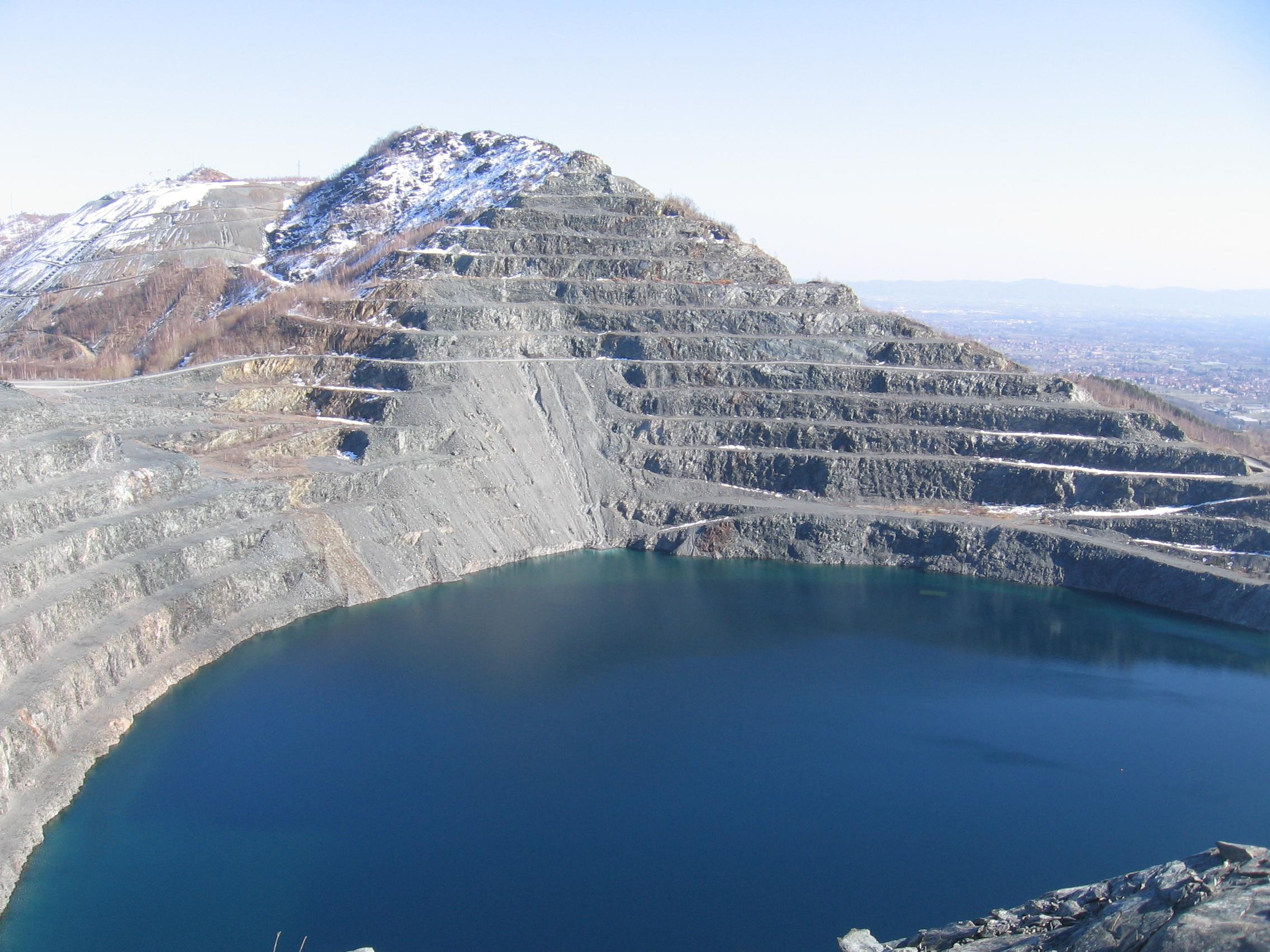 Cava abbandonata amiantifera di Balangero, Torino, Italia.